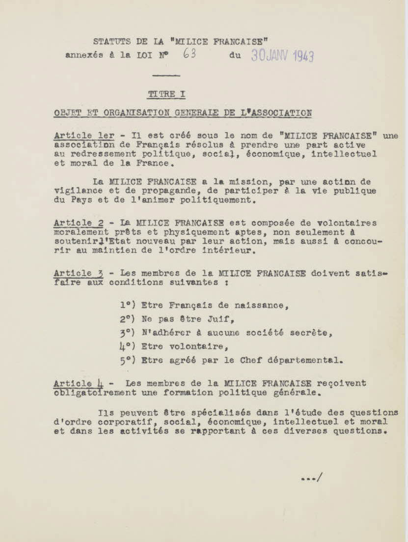 Original du statut de la Milice, annexée à la loi du 30 janvier 1943